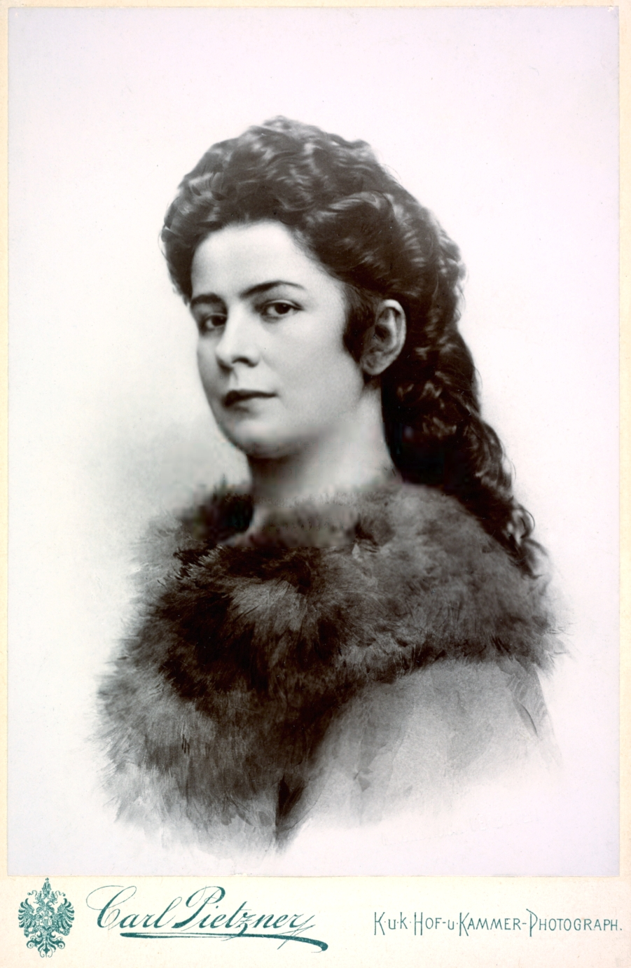 Elisabeth, Kaiserin von Österreich (1837-1898), Brustporträt, Retuschierter Albuminabzug (1898) von Carl Pietzner nach einer Aufnahme (1897) von Ludwig Angerer (1897) [1]